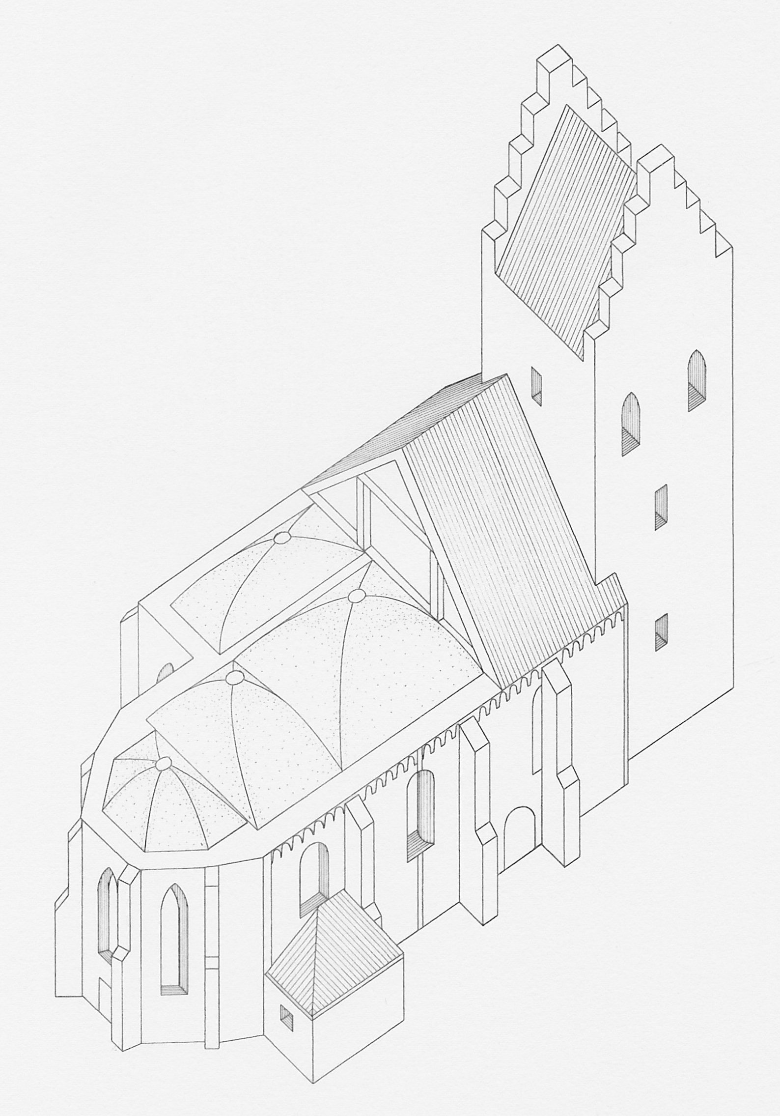 eigene Grafik nach einer alten Vorlage